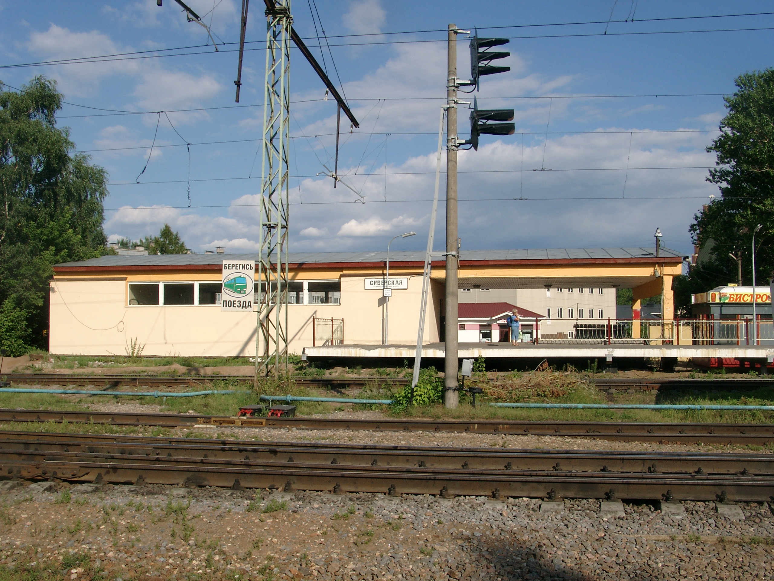 Станция Сиверская, Ленинградская область, Россия. Кассы и зал ожидания.